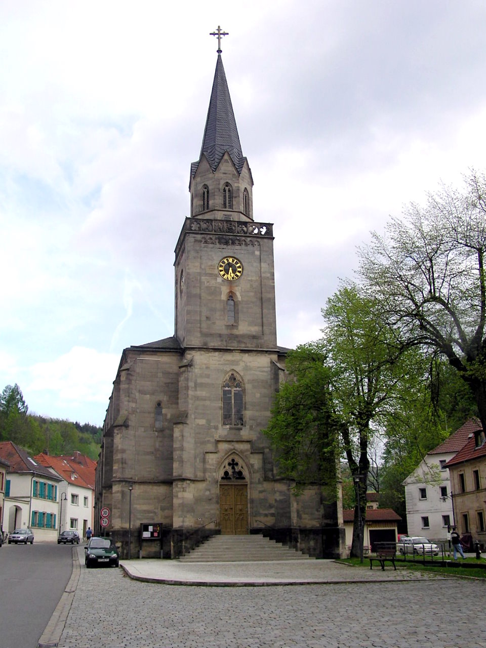 Evang.-luth. Stadtpfarrkirche St. Erhard in Goldkronach